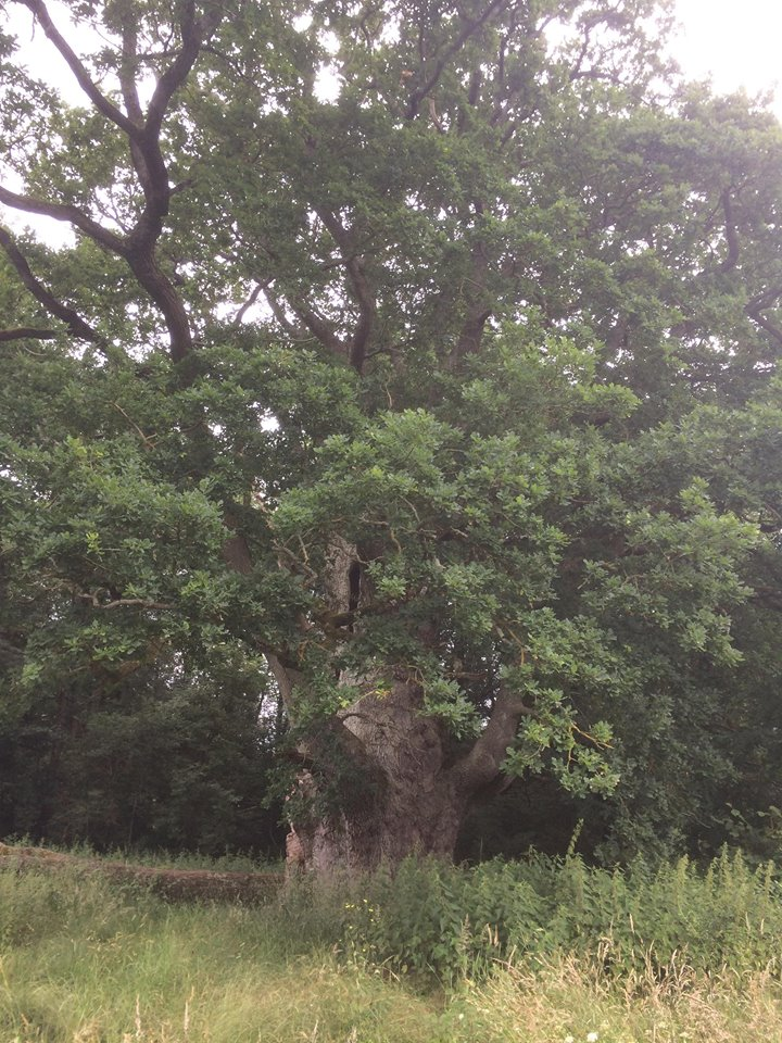 chêne situé à Chateau Bourdin, commune de St Pardoux 79